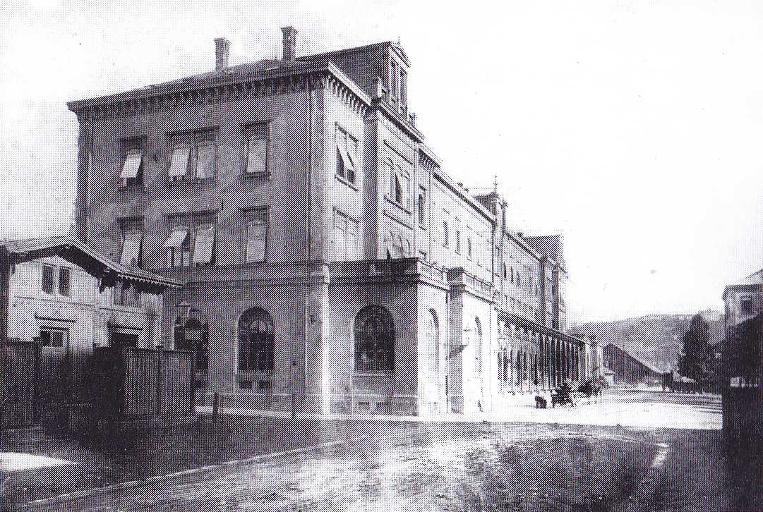 Das Bahnhofsgebäude nach dem ersten Umbau 1867, Aufnahme 1876